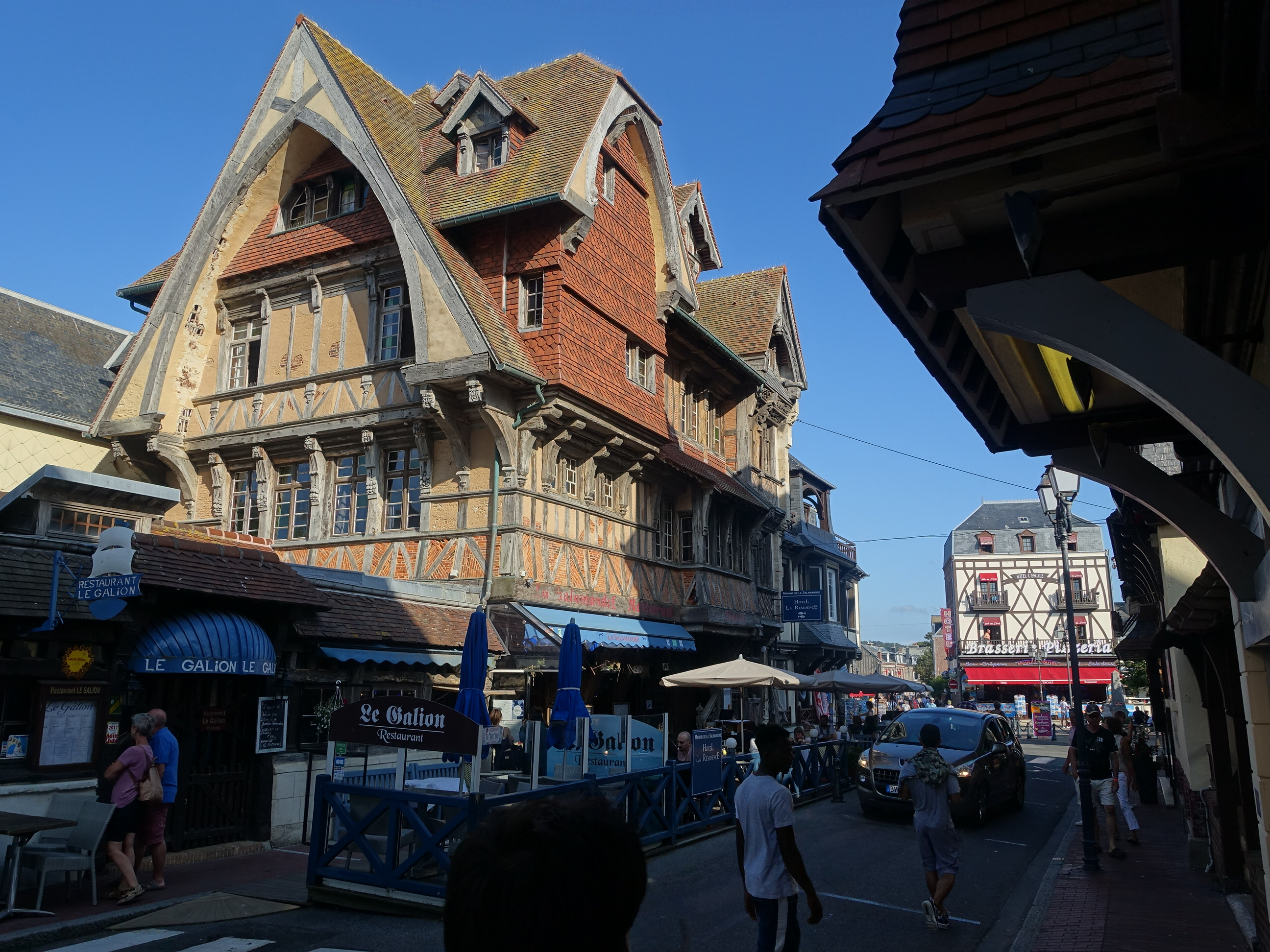 Manoir de la Salamandre in Ètretat